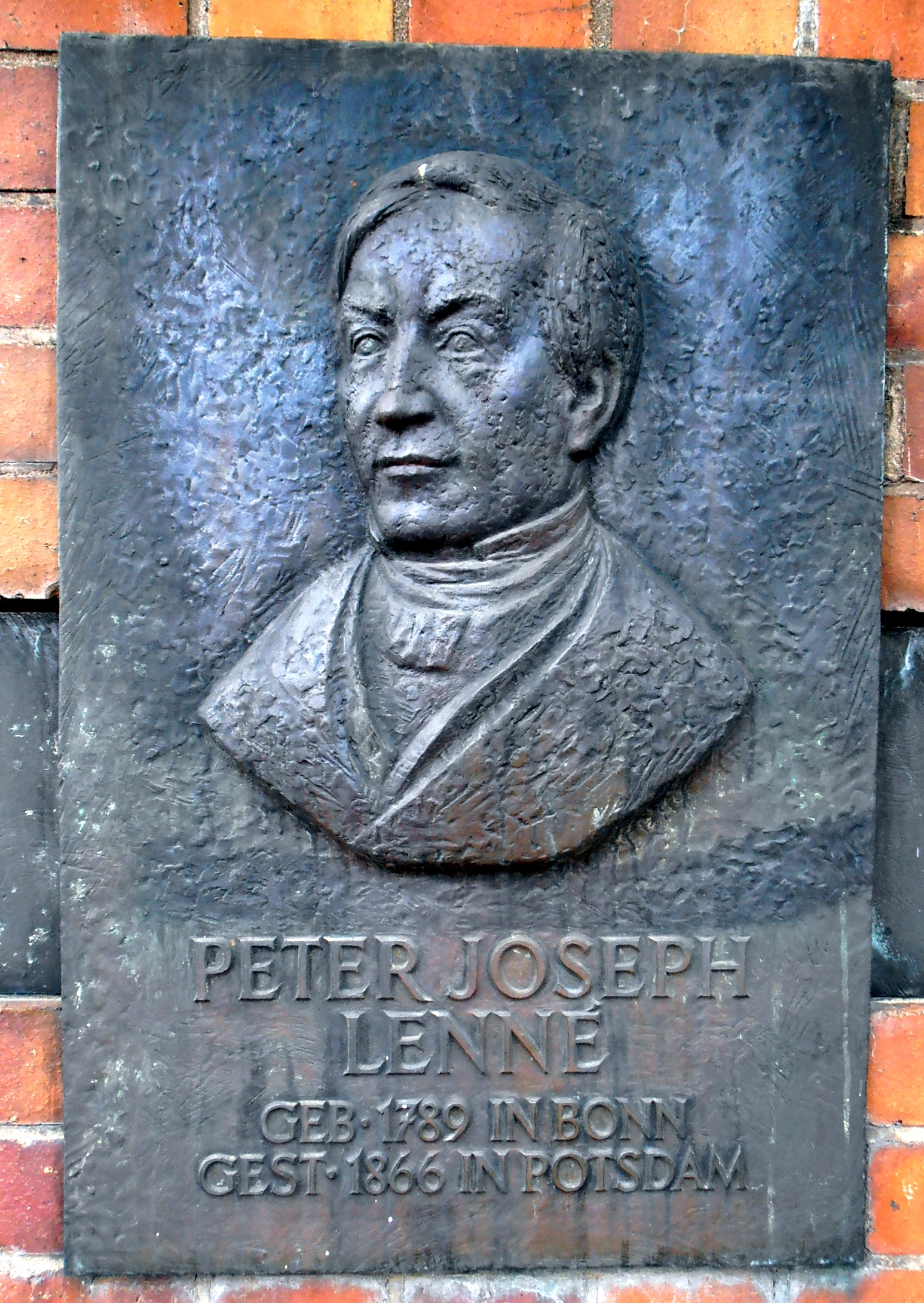 Egmar Ponndorf: Relief zum Gedenken an Peter Joseph Lenné am Dresdner Lennéplatz (1989) 2. Tafel von links